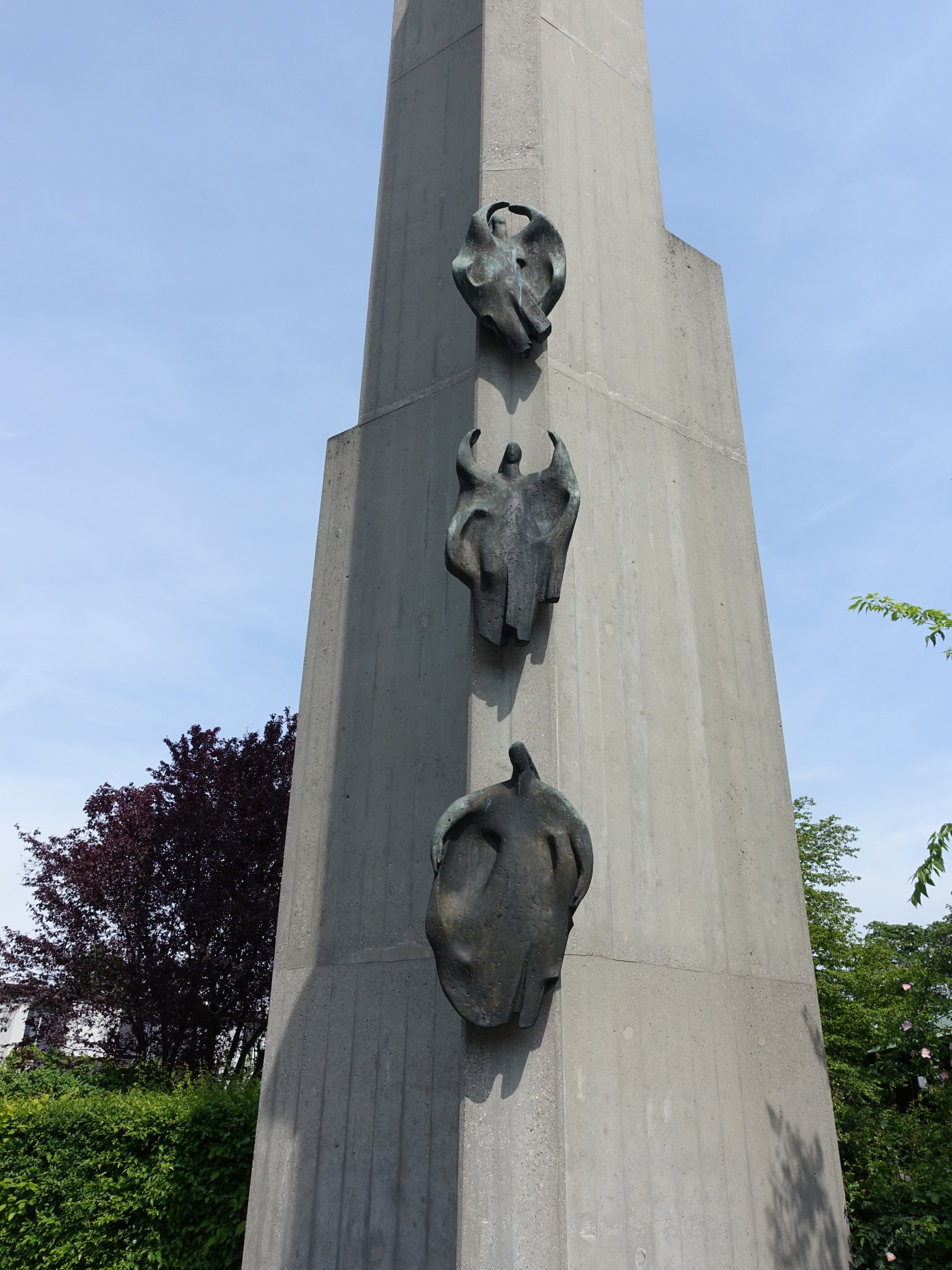 Drei Bronze-Engelfiguren (1964) an der Basler Gellertkirche von Hans Geissberger (1921–1999) Bildhauer und Maler